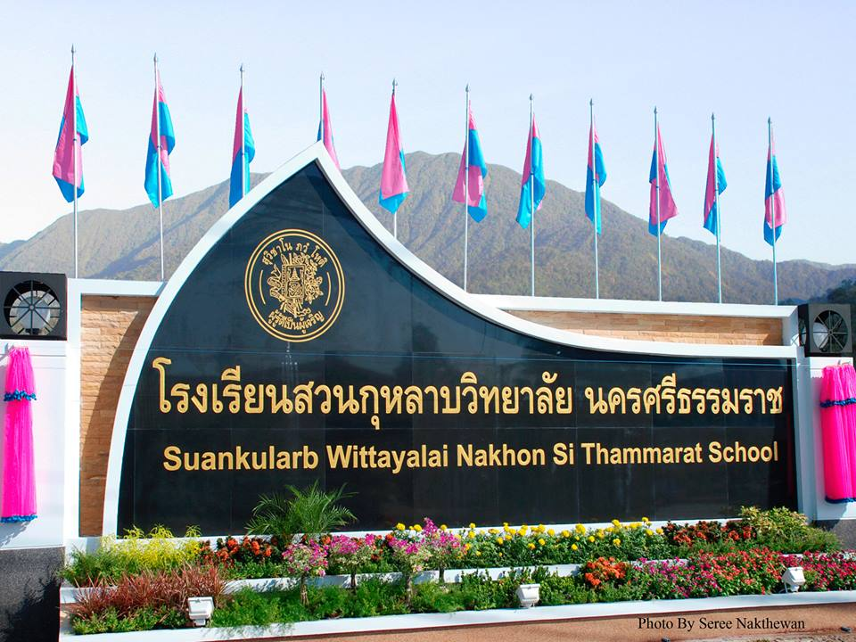 ป้ายด้านหน้าโรงเรียน